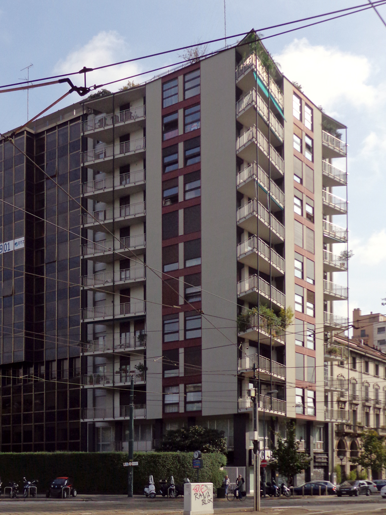 Milano, edificio residenziale in piazza della Repubblica 12 (angolo viale Vittorio Veneto), costruito nel 1955 su progetto di Gigi Ghò.Fonte: Fulvio Irace, Milano Moderna. Architettura e città nell’epoca della ricostruzione, Federico Motta Editore, Milano 1996, p. 64.